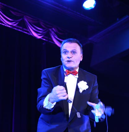 Bühnenszene mit Otto Wessely